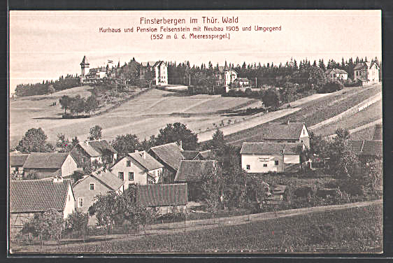 Finsterbergen 1905